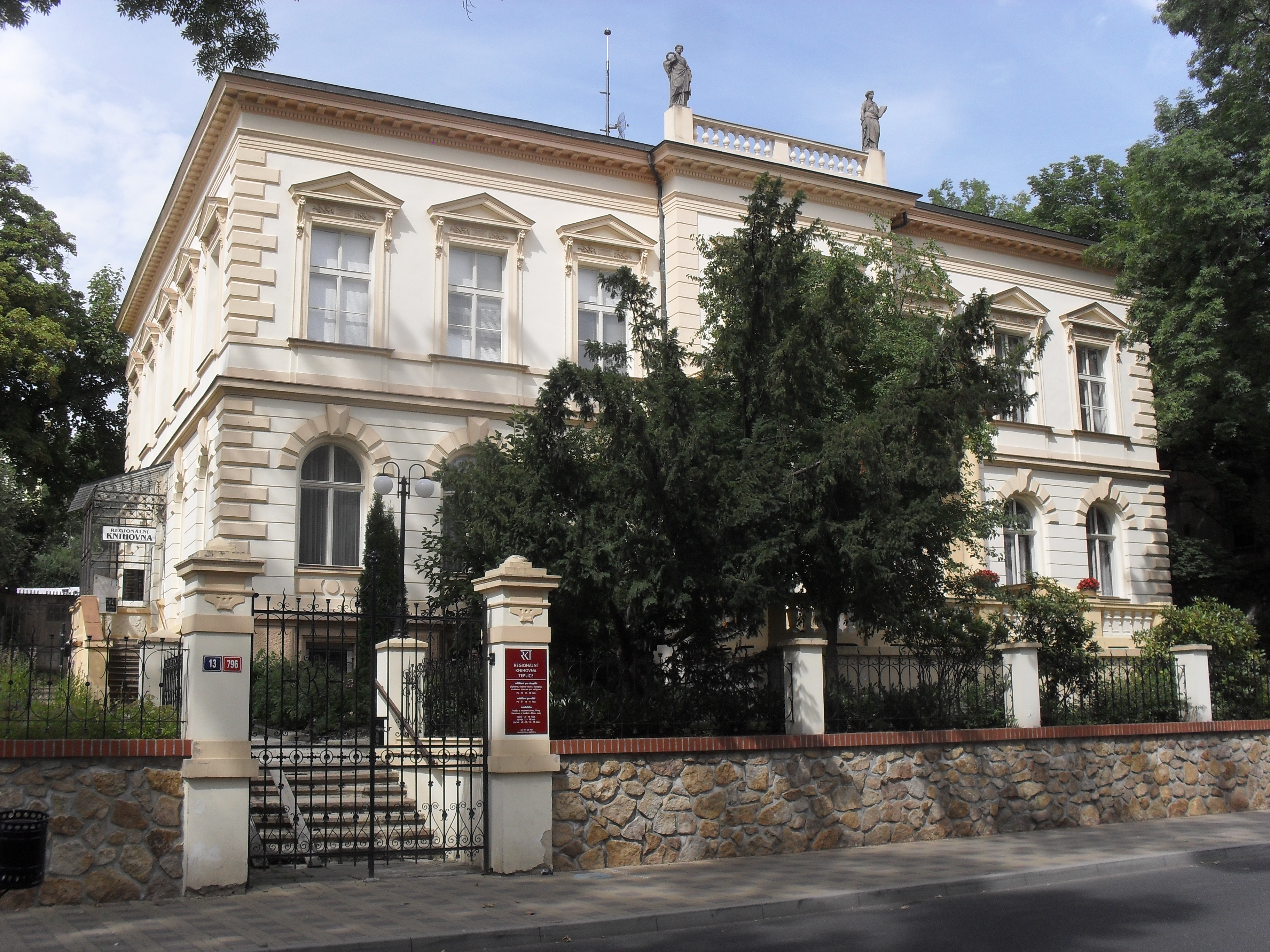 Vila (Teplice) - Lipová 796, Teplice, dnes slouží jako Městská knihovna.